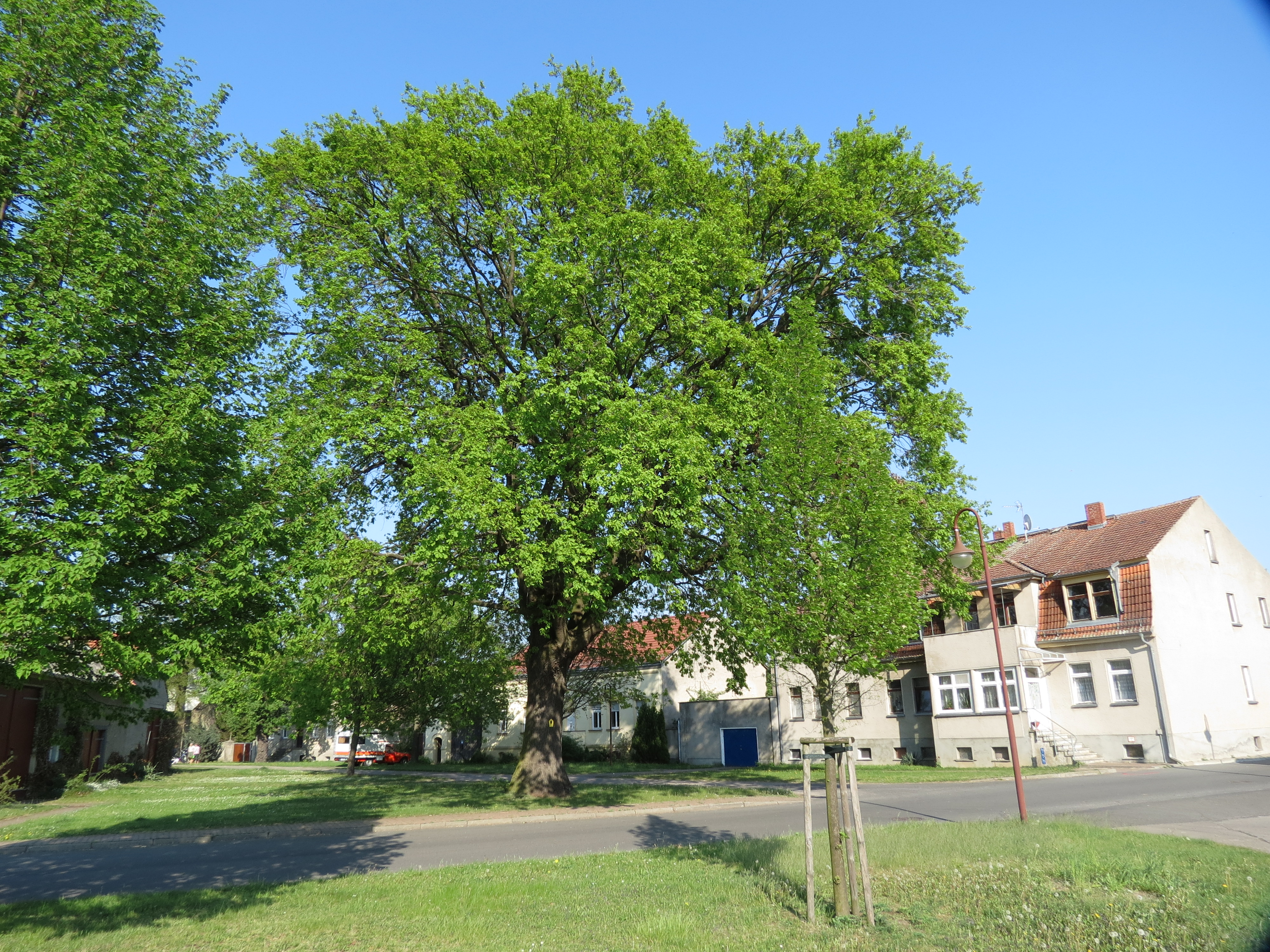 Lüdersdorf, Stadt Trebbin, Brandenburg, Deutschland, Dorfaue, Naturdenkmal Ulme